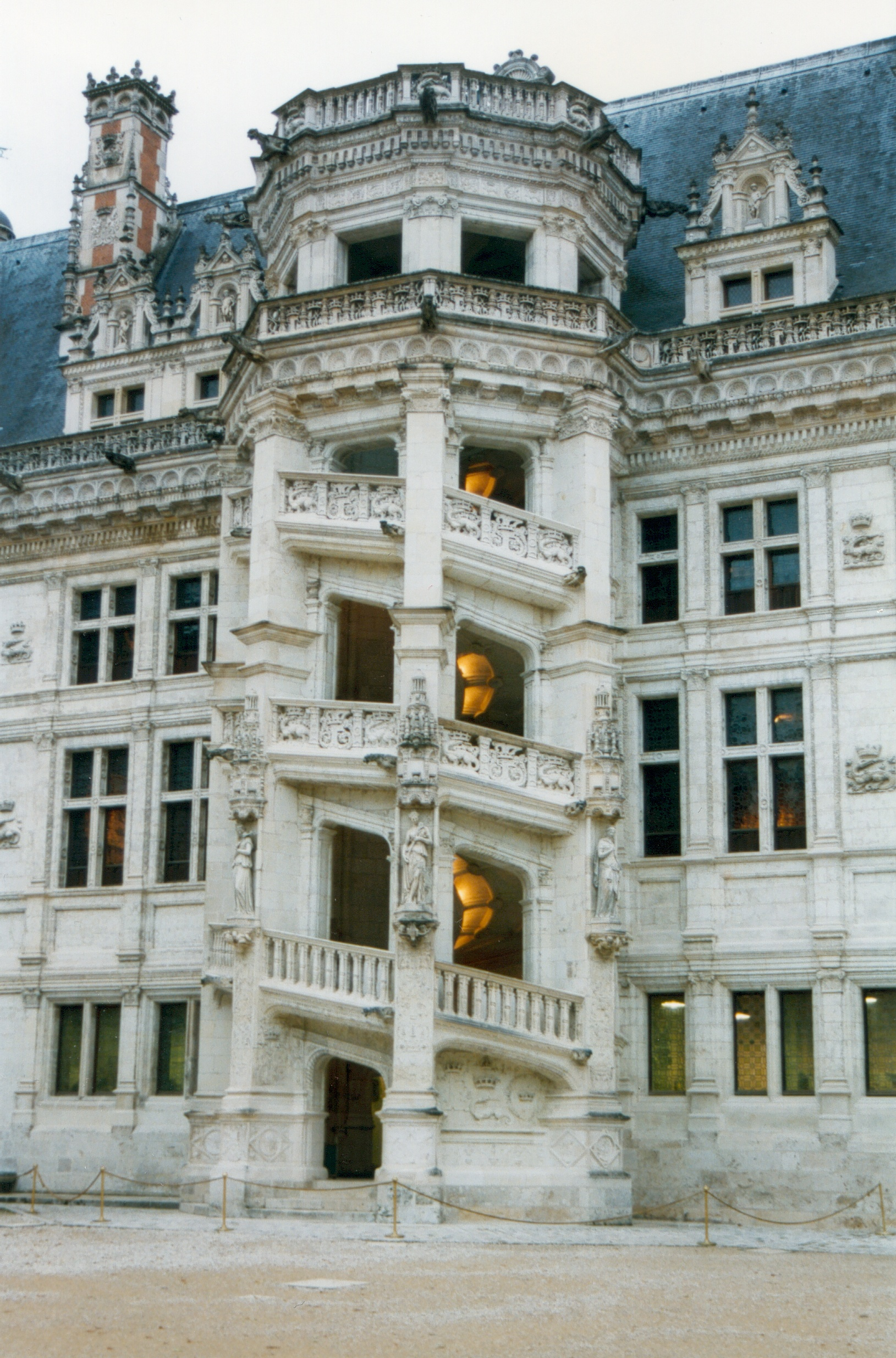 France Loir-et-Cher Blois Château Photographie prise par GIRAUD Patrick